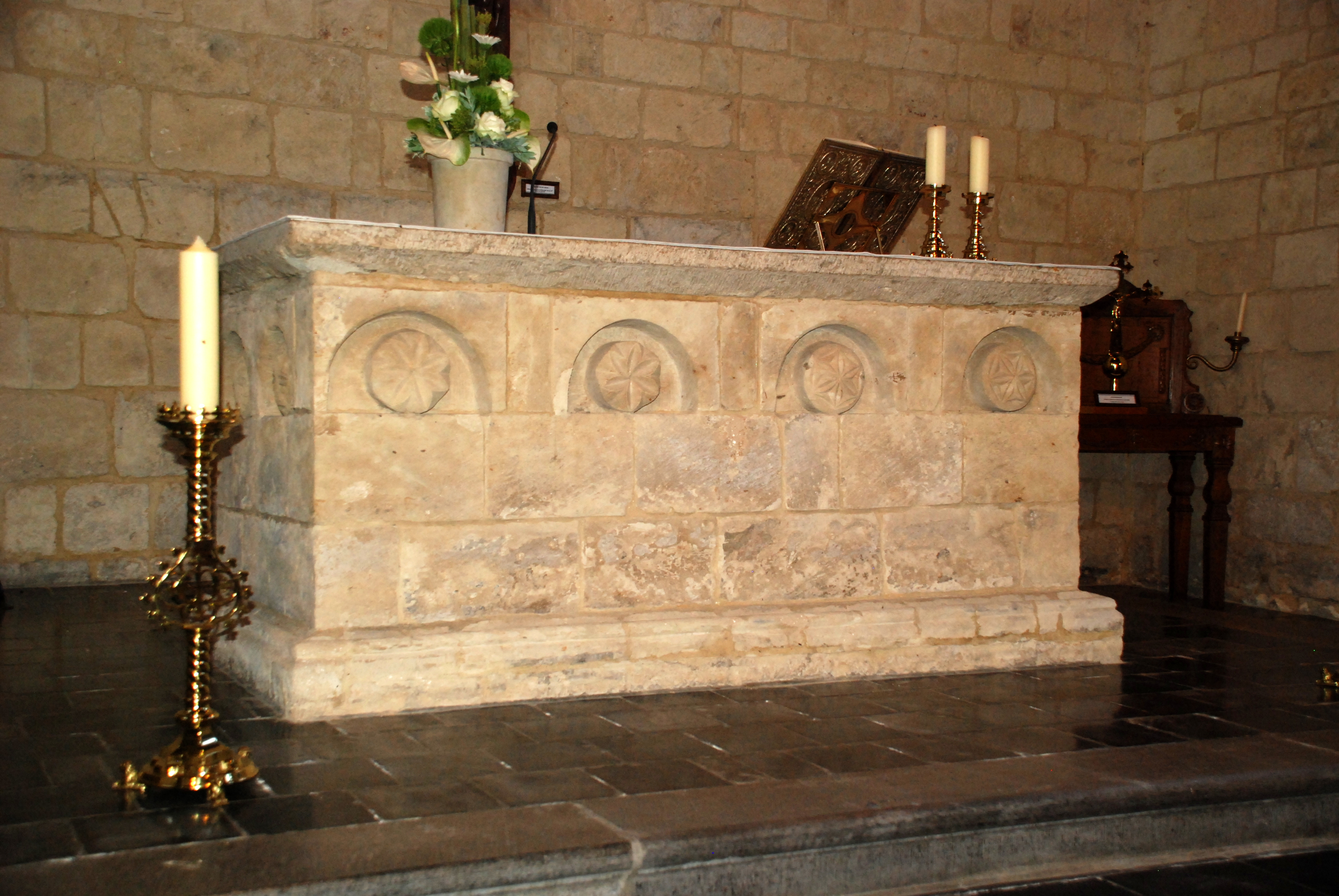 Belgique - Brabant flamand - Église Saint-Amand de Wezeren